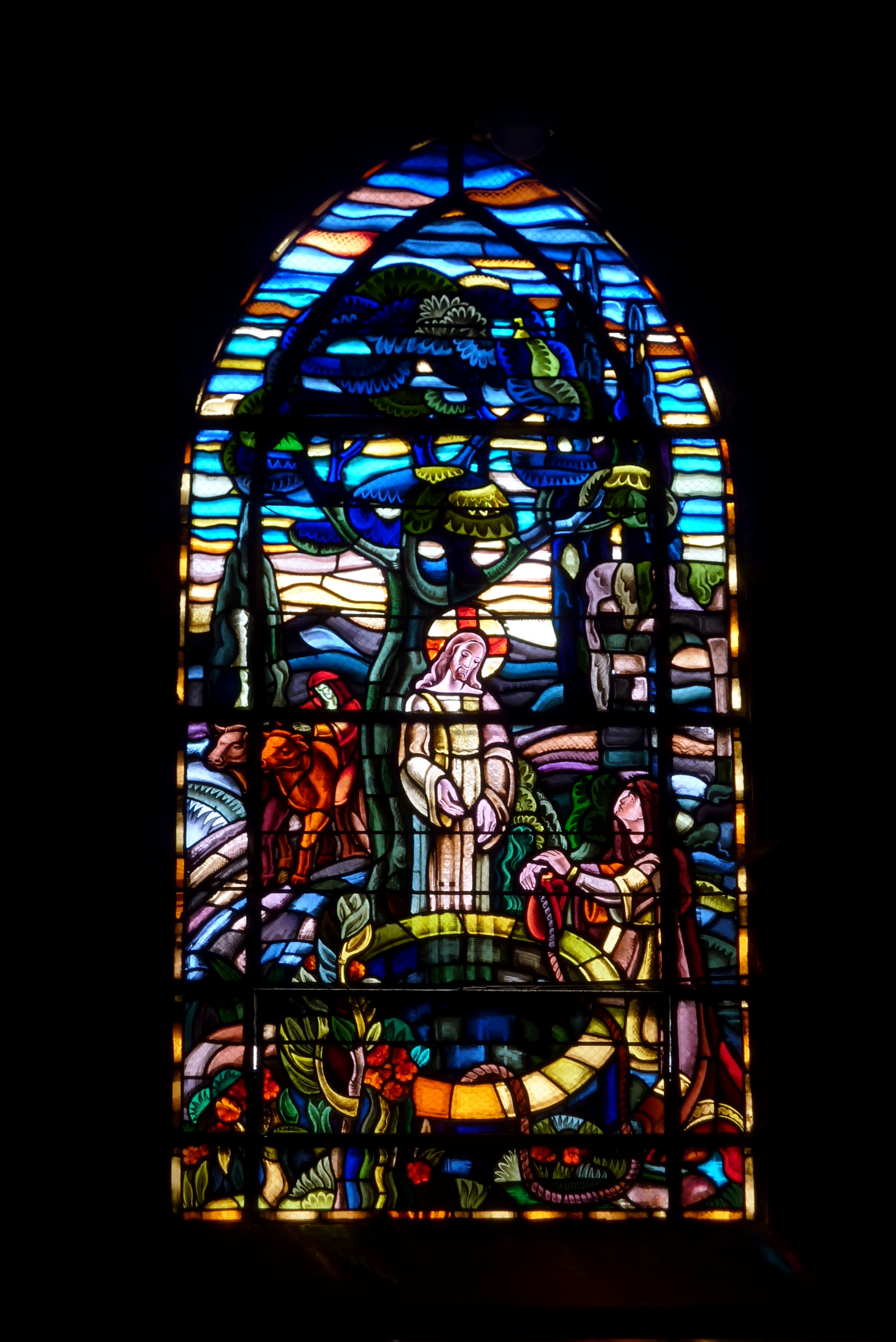 Bleiglasfenster in der Kathedrale Saint-Spire in Corbeil-Essonnes im Département Essonne (Île-de-France), Darstellung: Jesu und die Samariterin